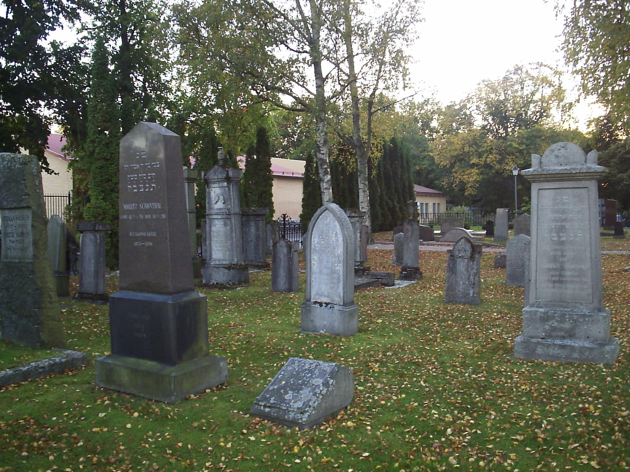 Judiska begravningsplatsen i Norrköping, den 6 oktober 2005.